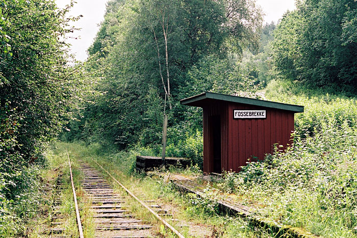 Fossebrekke holdeplass, Numedalsbanen.